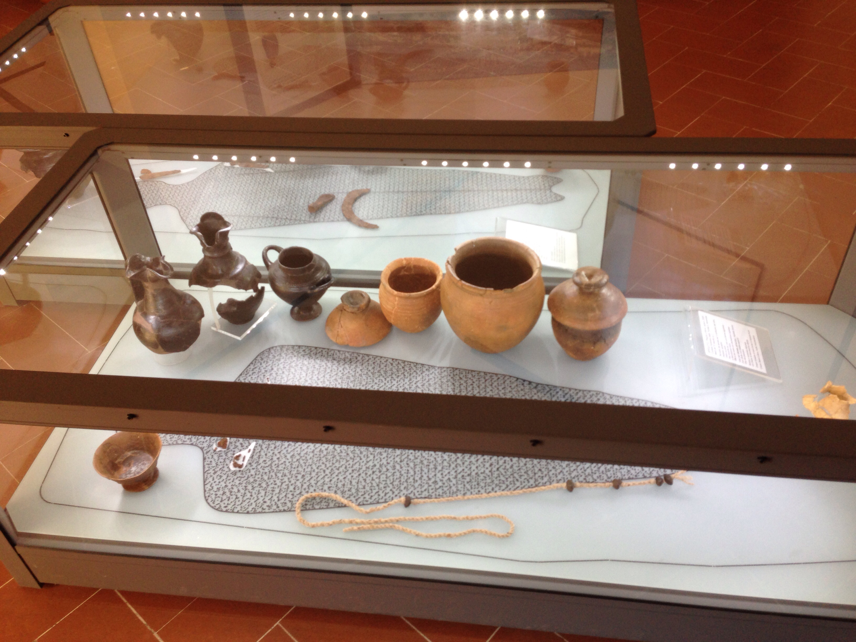 Museo archeologico Sant'Agata (Spoleto)